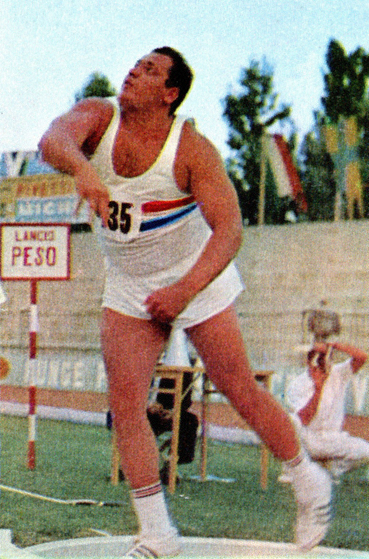 CAMPIONI DELLO SPORT 1967/68-n. 60 - V. VARJU - UNGHERIA -rec